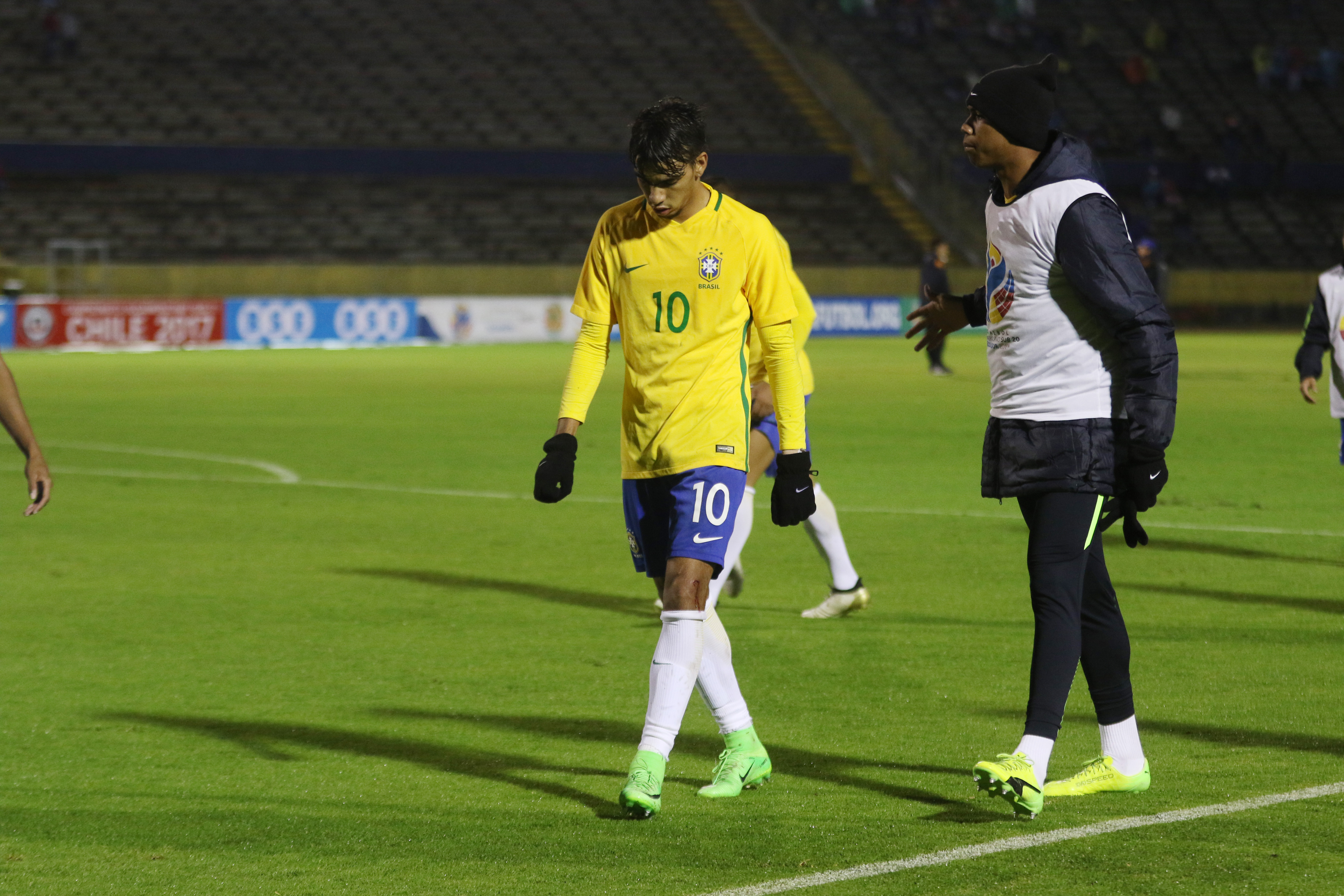 Quito, 2 de febrero del 2017 (Andes).- La selección uruguaya Sub 20 derrotó 2-1 este jueves a Brasil en el estadio Olímpico Atahualpa de Quito ante unas 3.000 personas, con lo que sumó seis puntos y se puso a tiro de la clasificación al Mundial Corea del Sur 2017. ANDES/Micaela Ayala V.